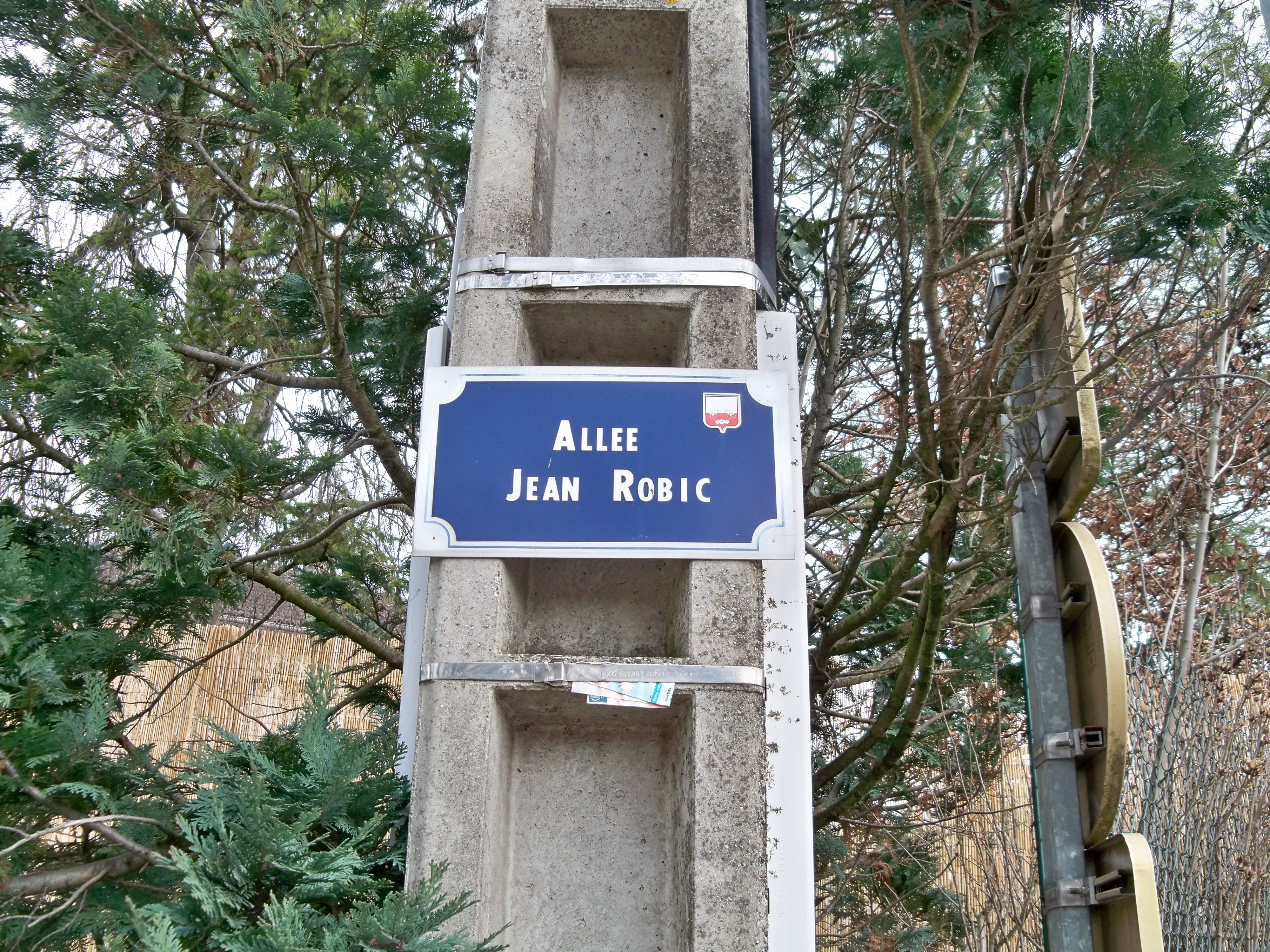 plaque alle Jean Robic à Wissous (91)